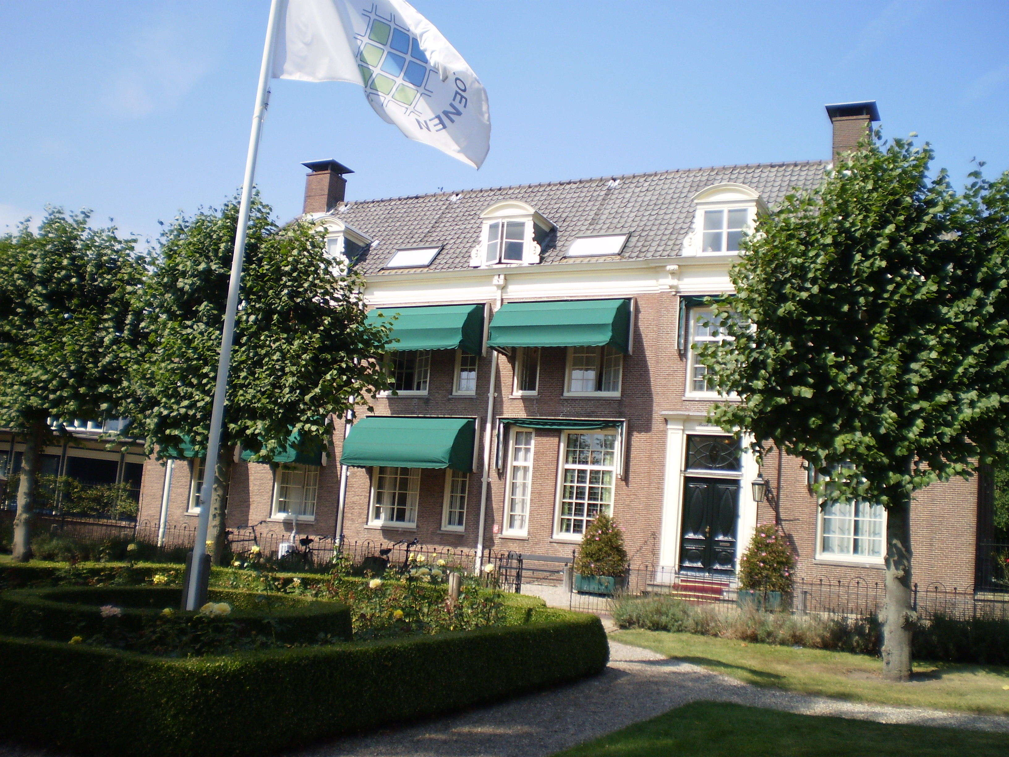 Buitenplaats Beek en Hof in 2009, destijds het gemeentehuis van Loenen